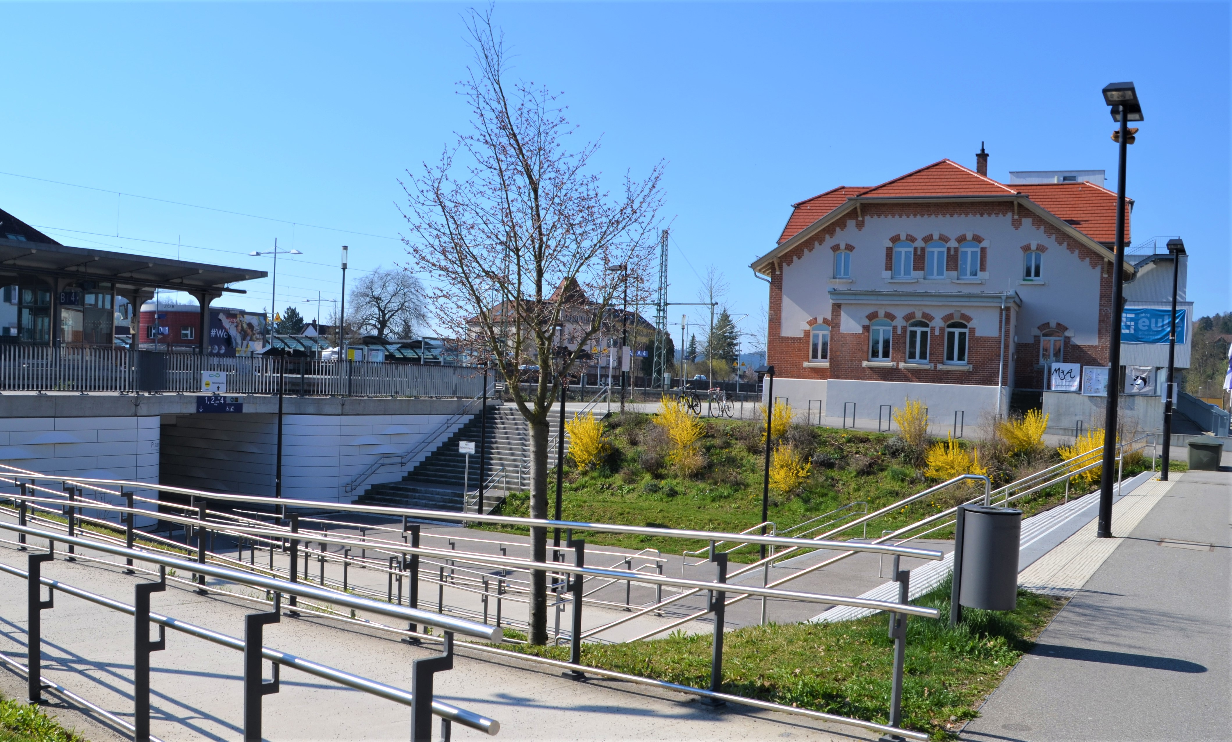 Abgang zur Pleuer-Passage im Schwäbisch Gmünder Bahnhof mit ehem. Güterbahnhof im Hintergrund